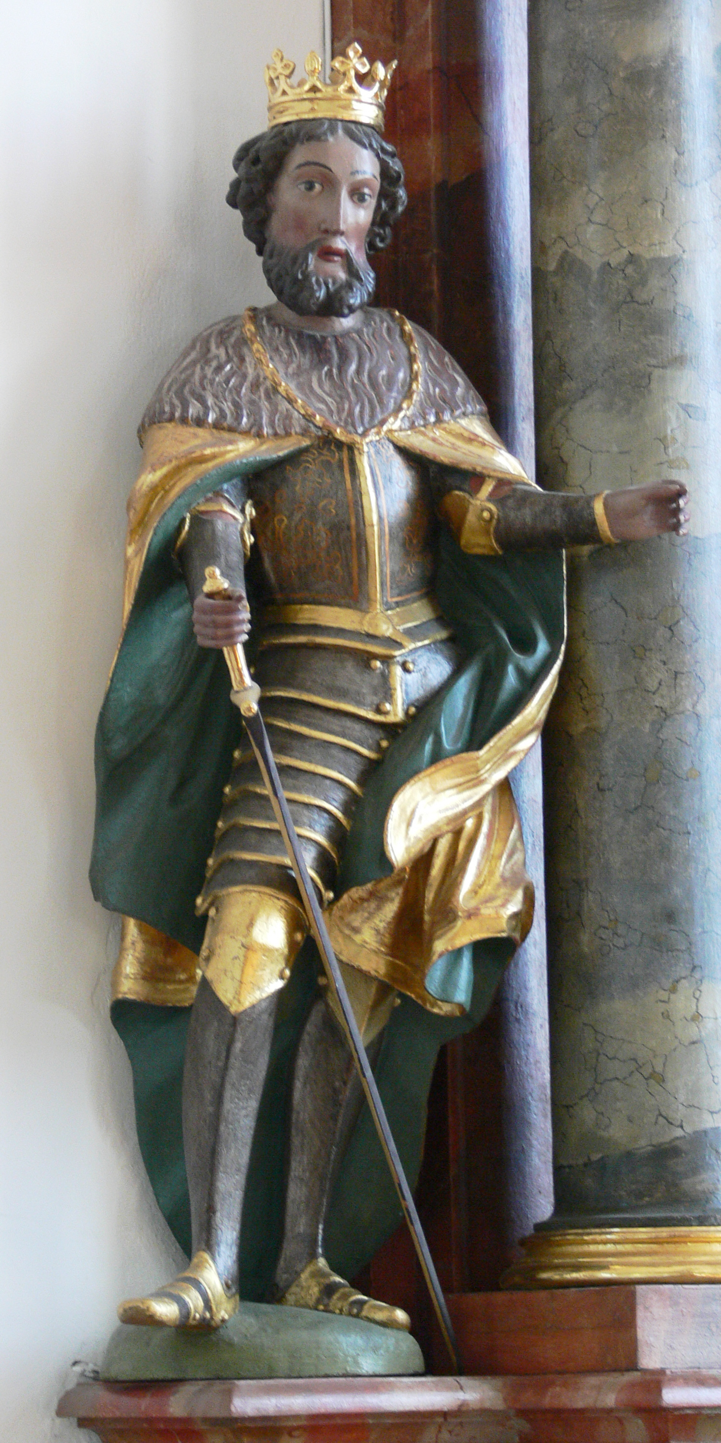 Pfarrkirche St. Magnus, Waldburg, Landkreis Ravensburg Magnusaltar: Figur "Hl. Heinrich II."